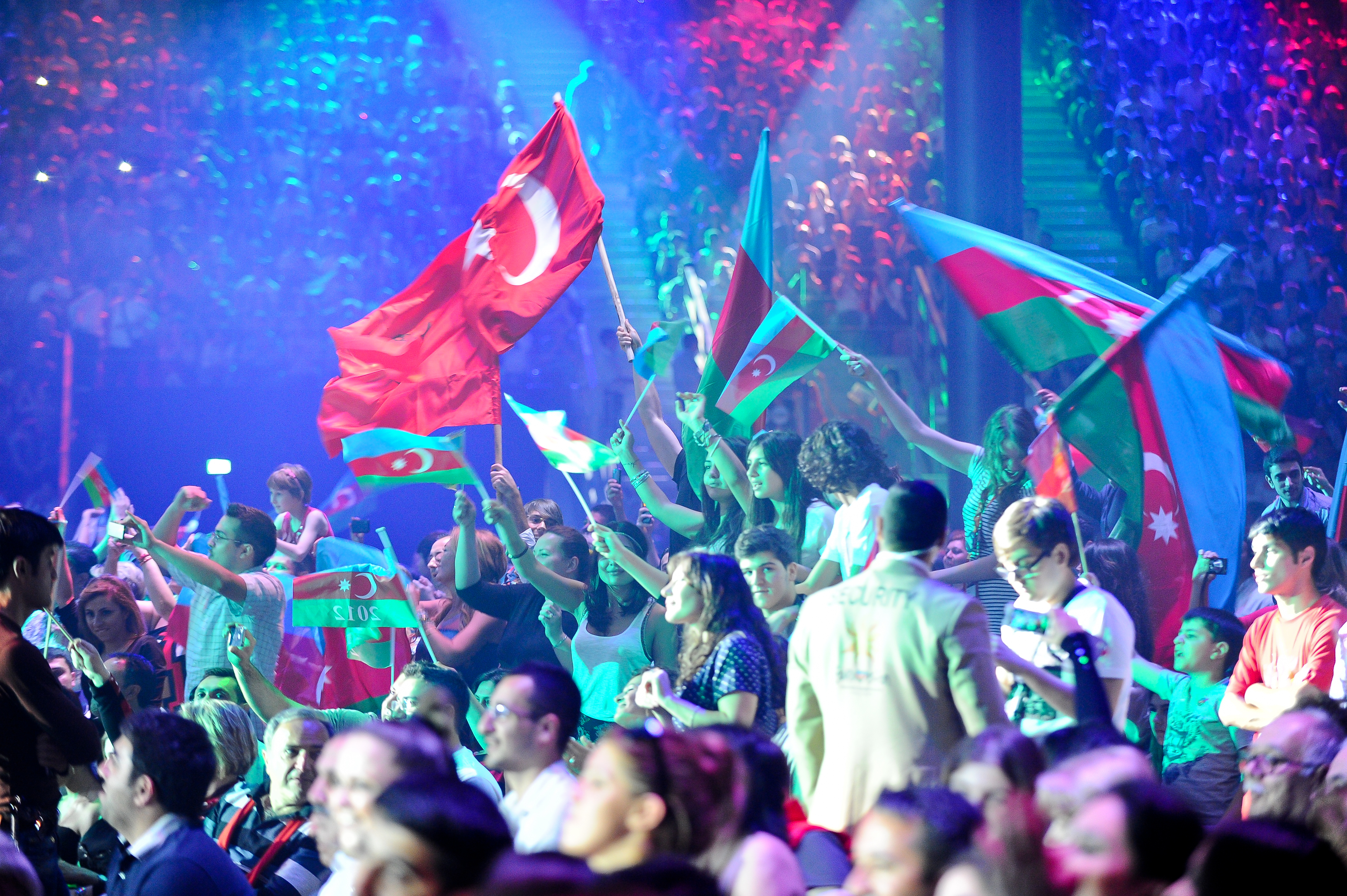 Болельщики Евровидения 2012 в Baku Crustal Hall